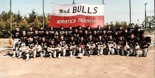 trani 1990